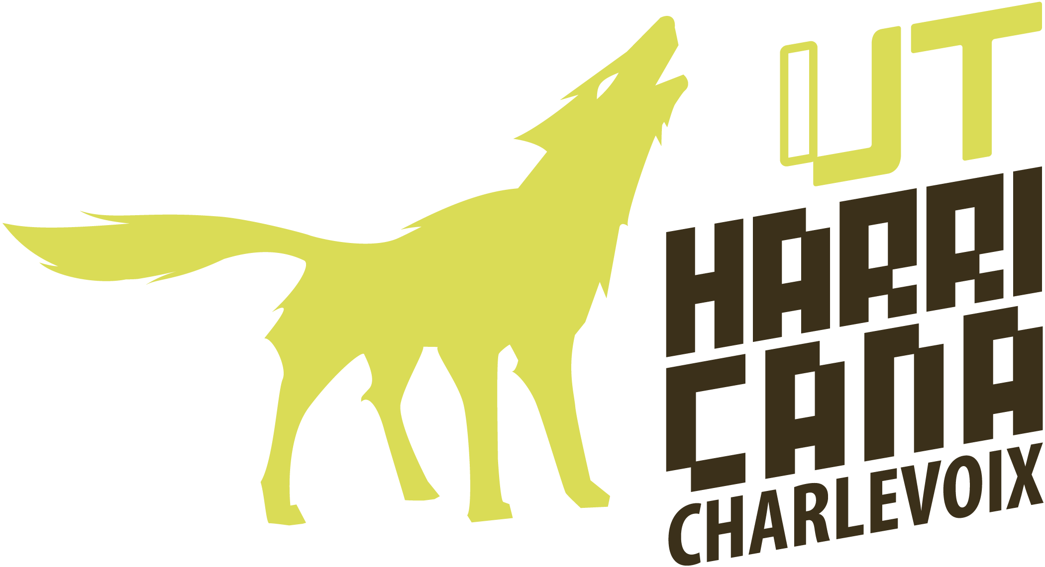 logo officiel ultra-trail Harricana de Charlevoix UTHC